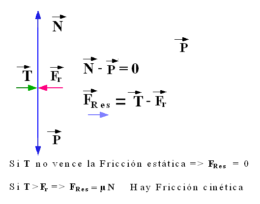 Diagrama simple para observar actuación de fuerzas de fricción estática y dinámica